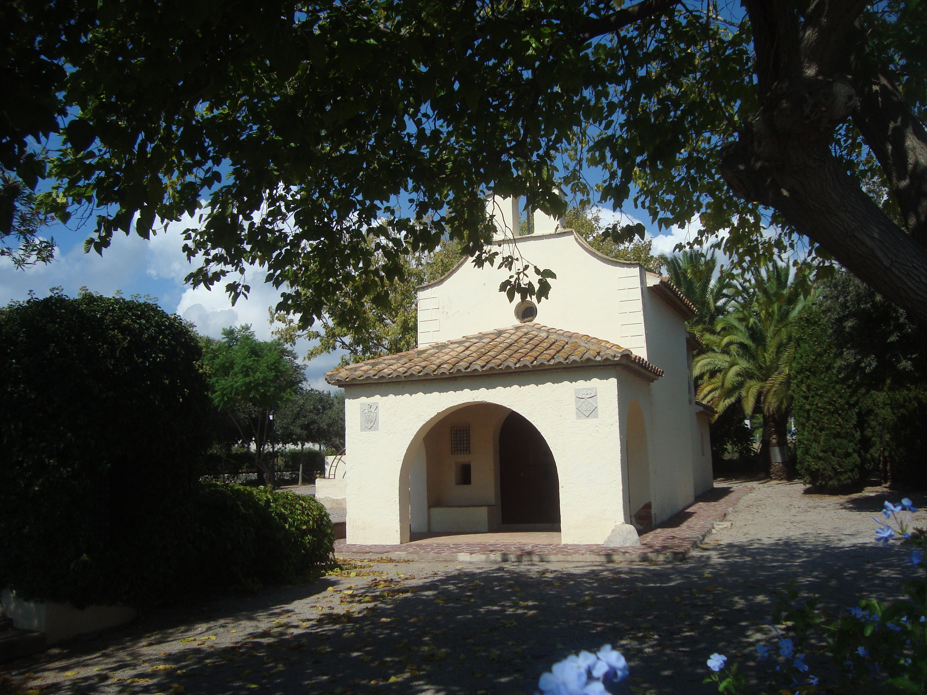 Ermita de Sant Francesc de la Font (Castelló de la Plana) 05.040-011.